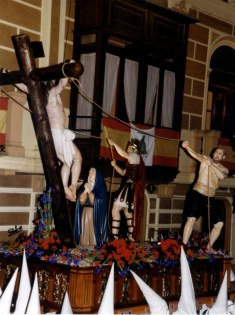 La Exatacion de Requena